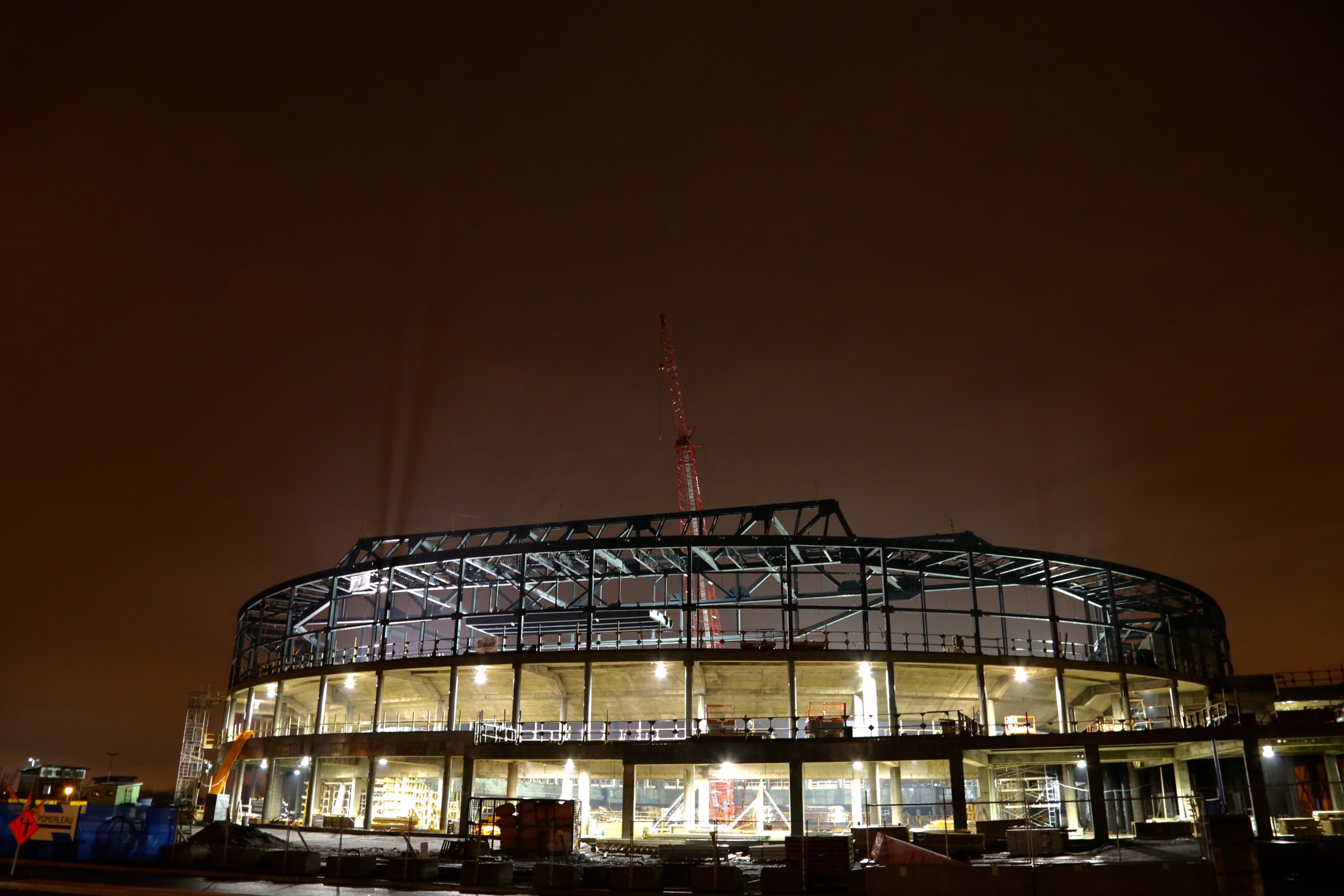 Chantier de construction de la Place Bell à Laval